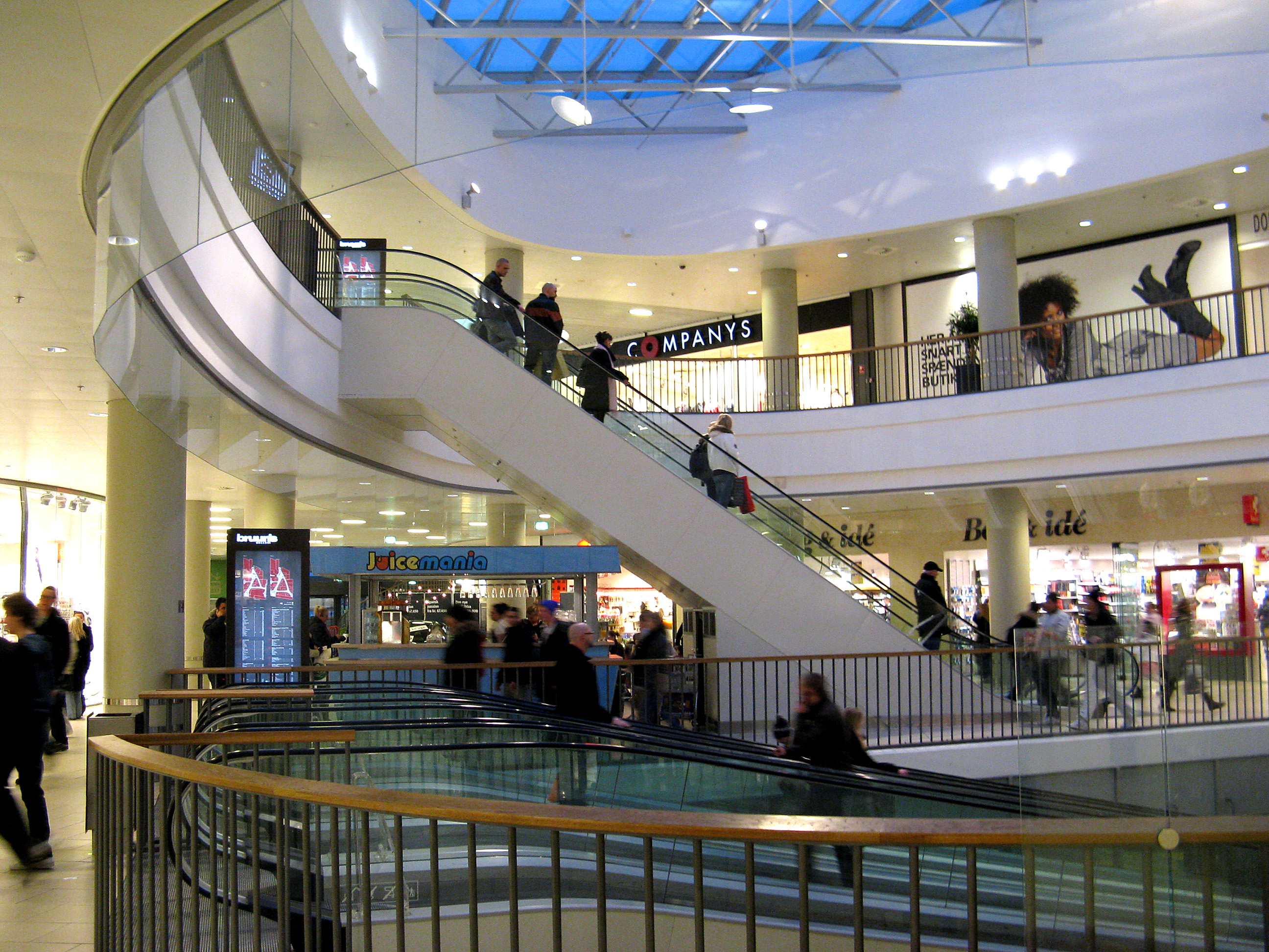 Bruuns Galleri i Århus